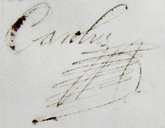 Unterschrift Karl VI. im lateinischen Adelsbrief für André Falquet von 1725